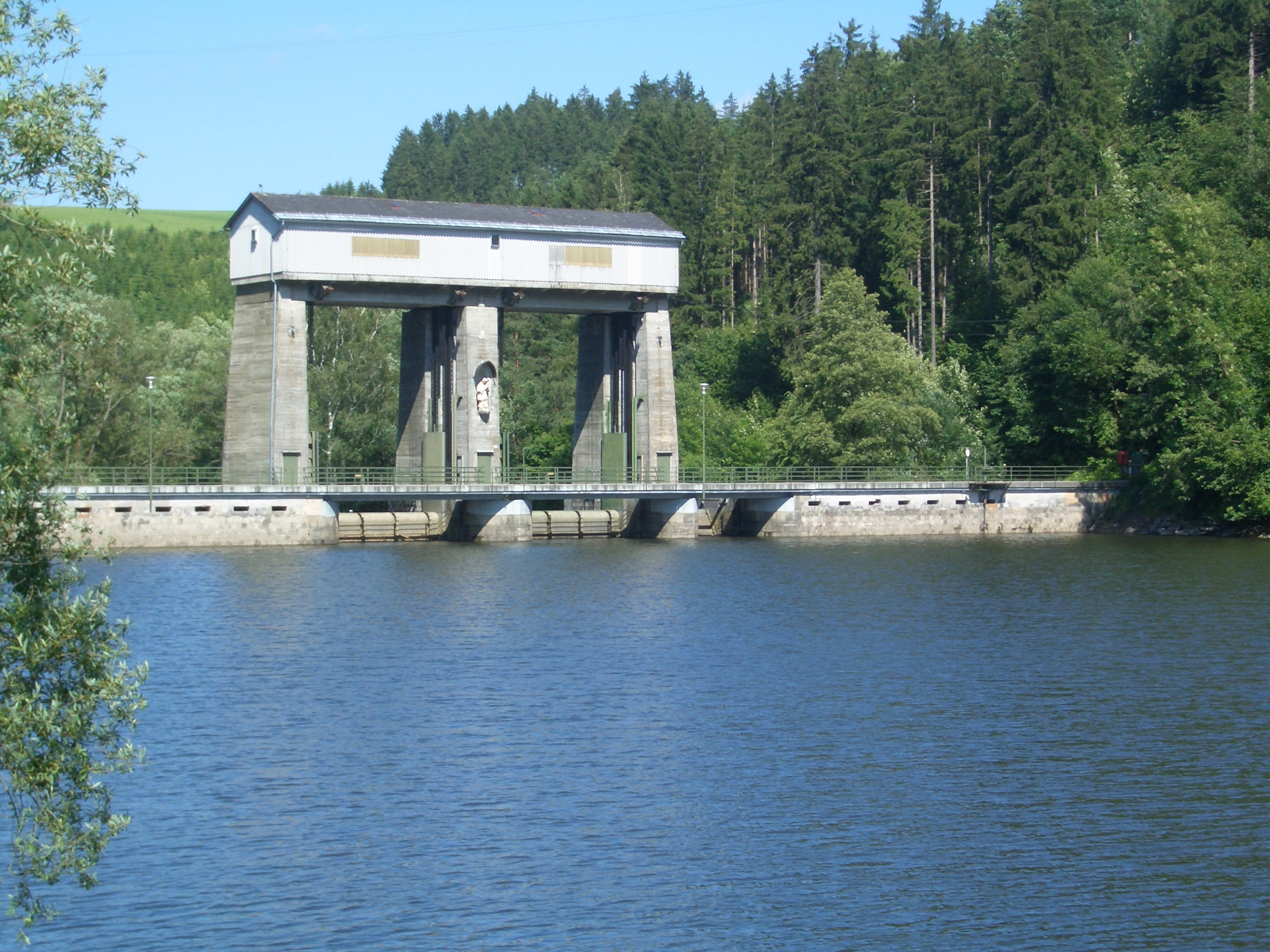 Das Foto zeigt den Stausee Neufelden mit der Staumauer.